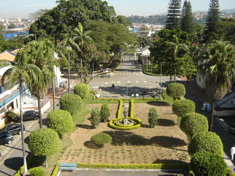 Unidade de Atendimento da Santa Casa de São Paulo. Av. Guapira, 2.674 Jaçanã - São Paulo/SP